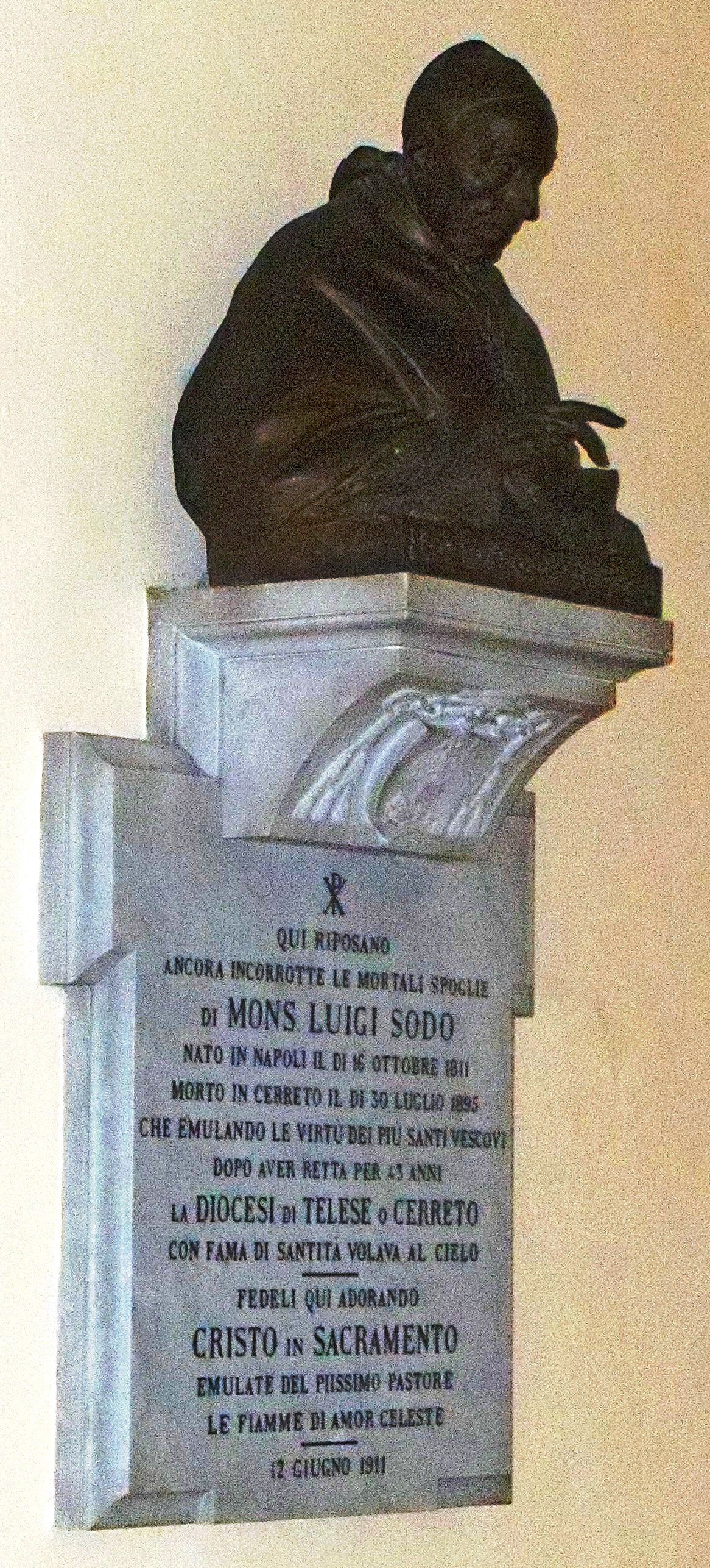 Tomba di Mons. Luigi Sodo, vescovo della Diocesi di Cerreto o Telese nel XIX secolo. Cappella del Sacramento, Cattedrale di Cerreto Sannita (Benevento).